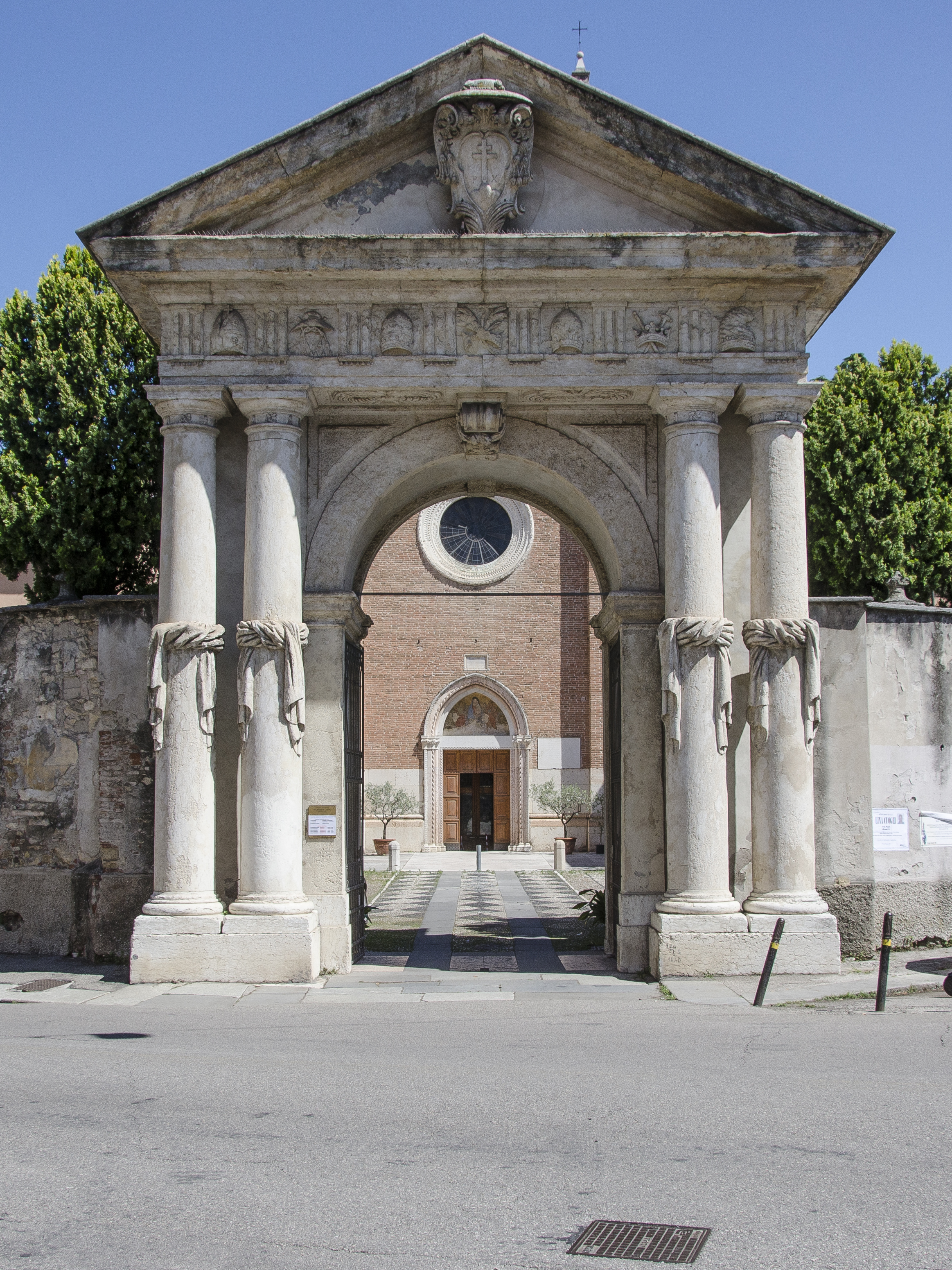 Chiesa dei Santi Nazaro e Celso a Verona. Esterno.